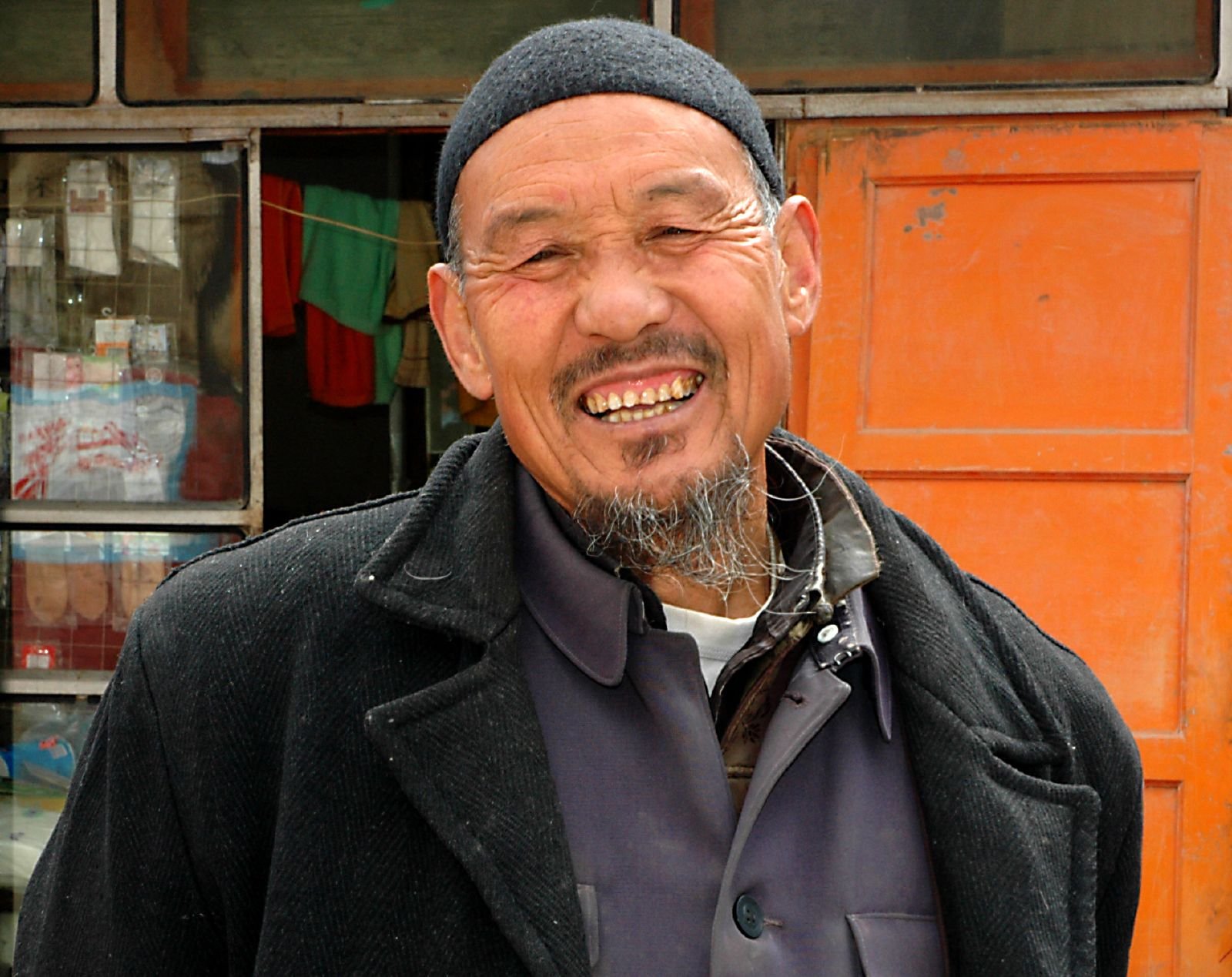 Dongxiang.